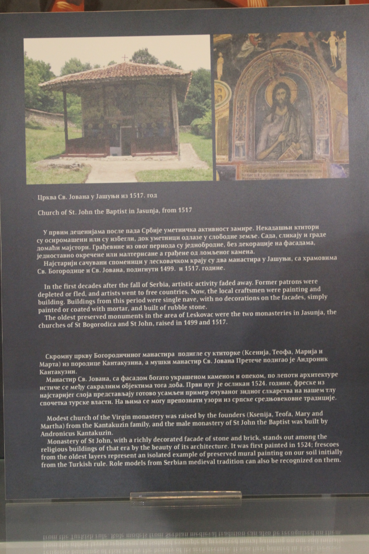 Srpski (latinica): Tematska celina Srednji vek.